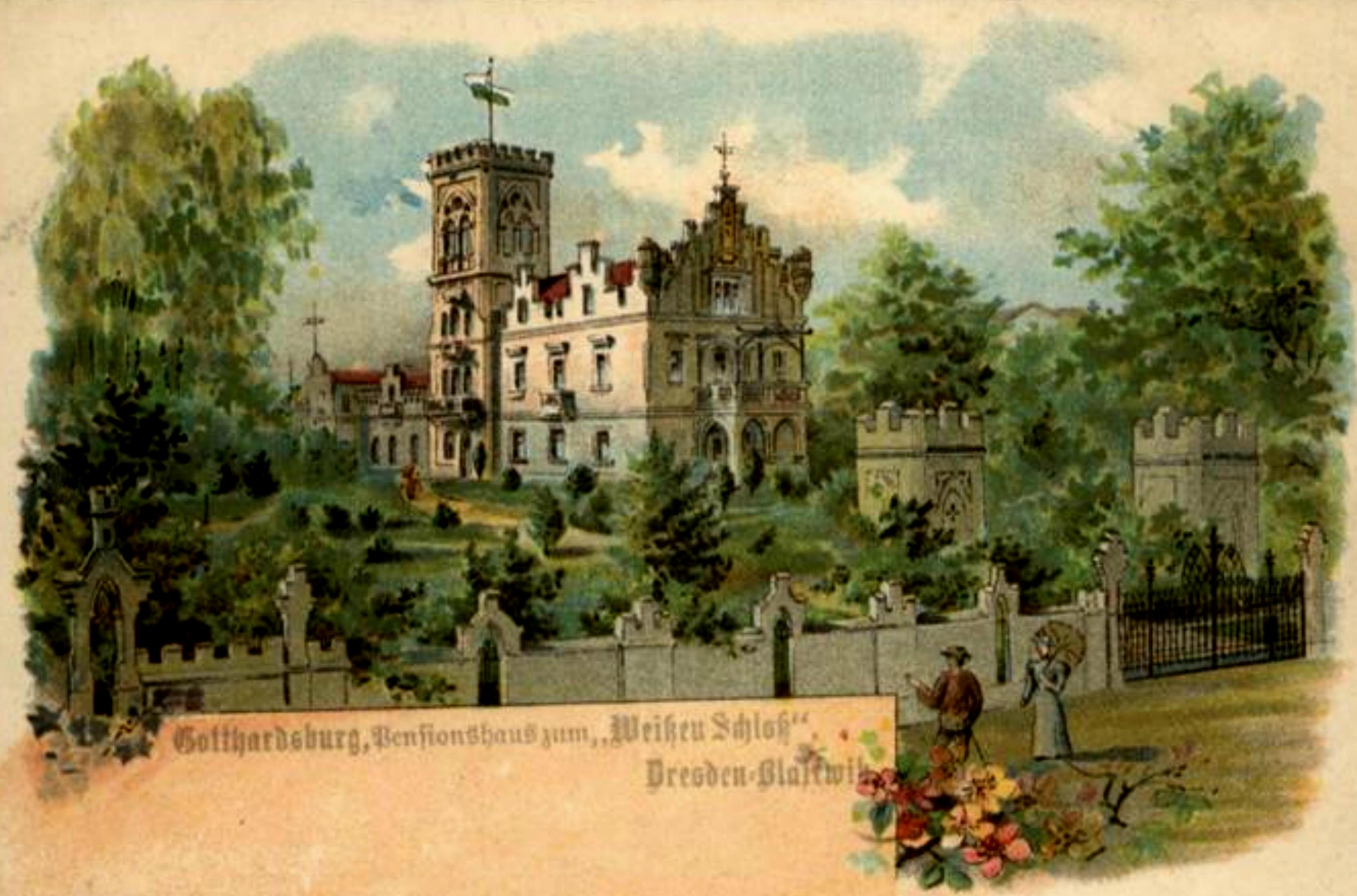 Dresden - Blasewitz, Weißes Schloss Gästehaus Pensionshaus an der Schubertstraße Ecke Emser Straße das Haus St. Gotthardsburg. Ansichtskarte um 1890